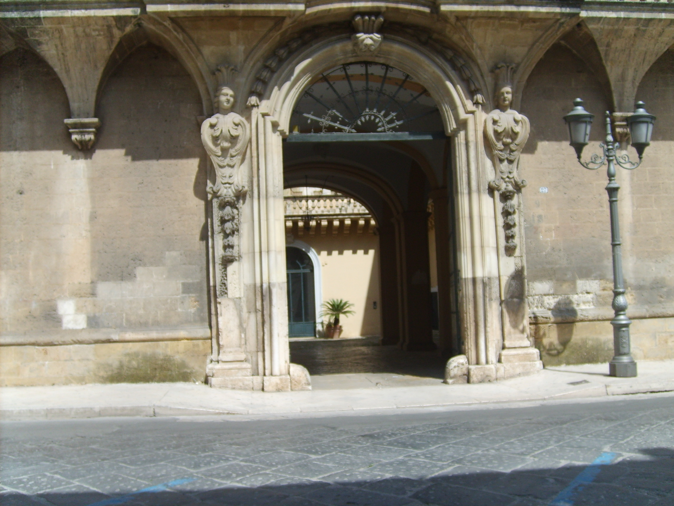 Portone principale di Palazzo Carissimo